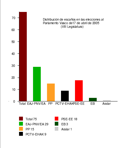 Resultados de las elecciones al Parlamento Vasco (España) de 2005. A partir de un